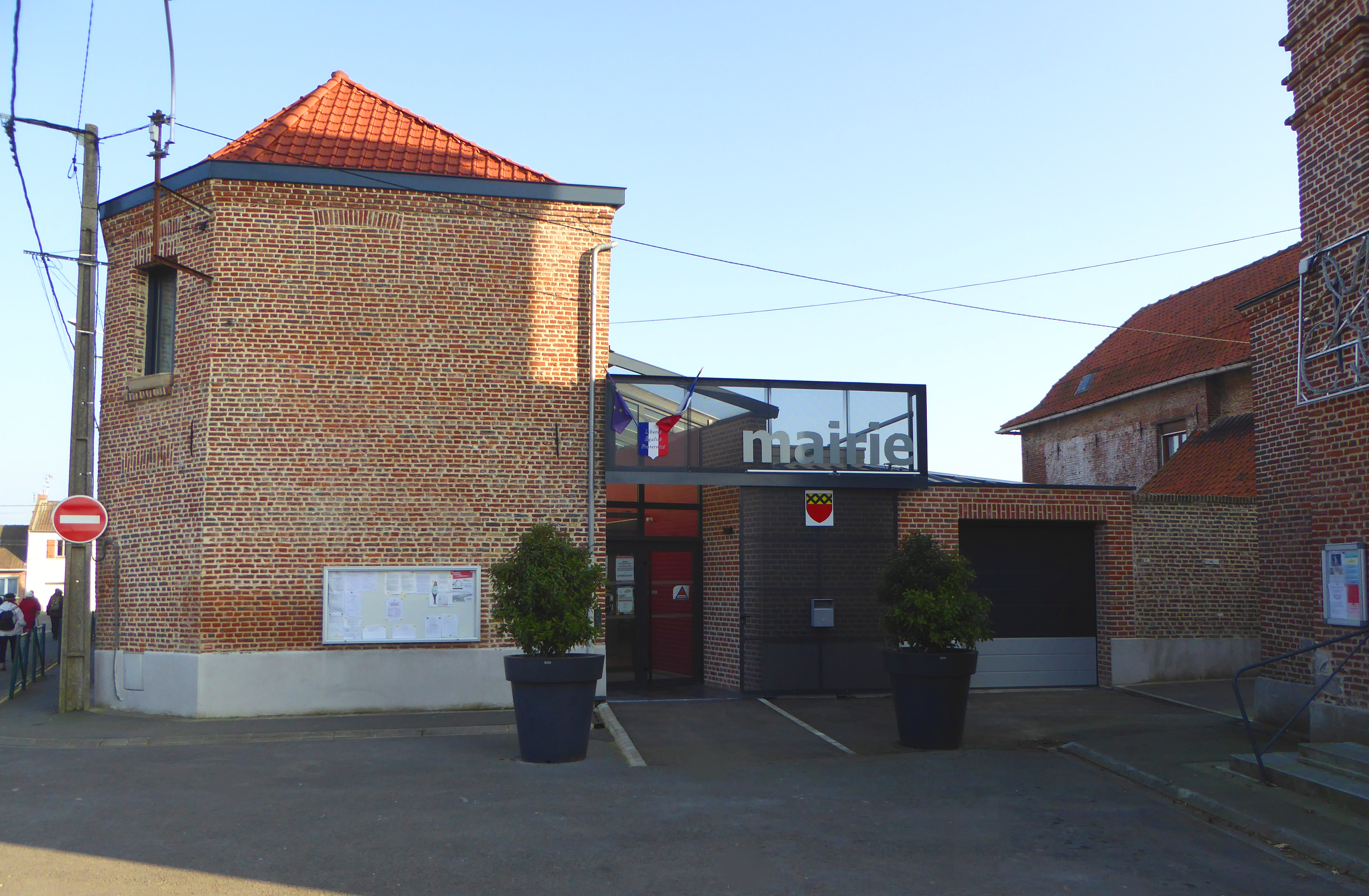 Mairie d'Herrin Nord_(département_français).- Hauts-de-France